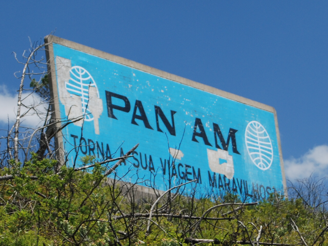 Old PanAm asdvertsign (Serra de Aire-Portugal)